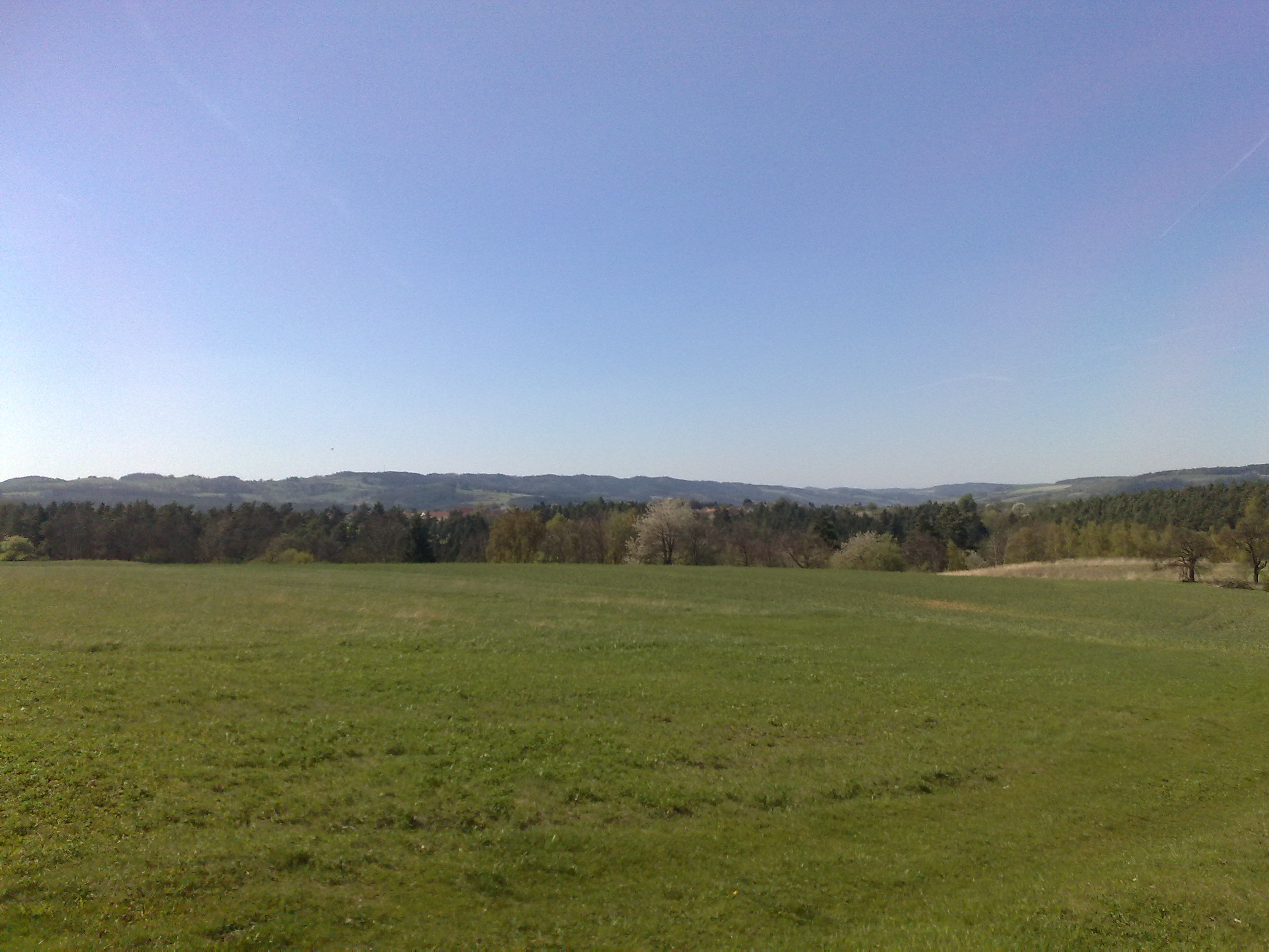 Pohled na krajinu Halasova Kunštátska ze Lhoty u Letovic